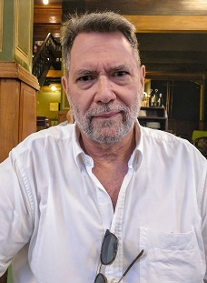 Imagen realizada a Enric Ucelay-Da Cal en encuentro personal el 10 de septiembre de 2010 a las 10.15h.